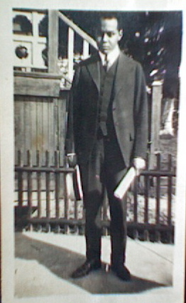 Chandler Owen